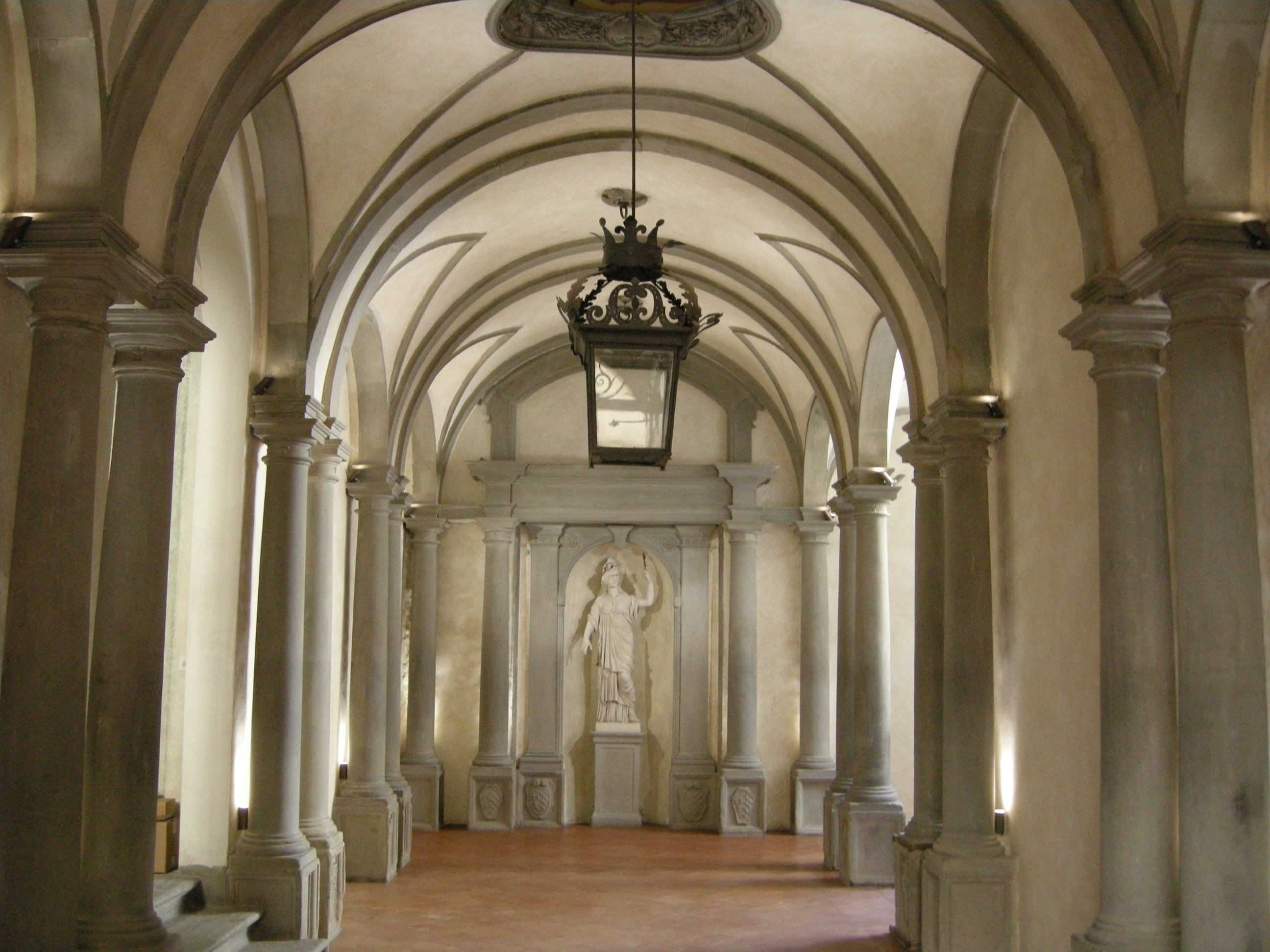 Palazzo bartolommei, androne